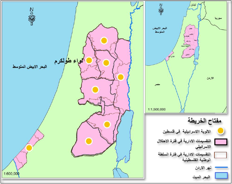 خارطة محافظة طولكرم (وتشمل محافظتي قلقيلية وسلفيت) 1967-1993